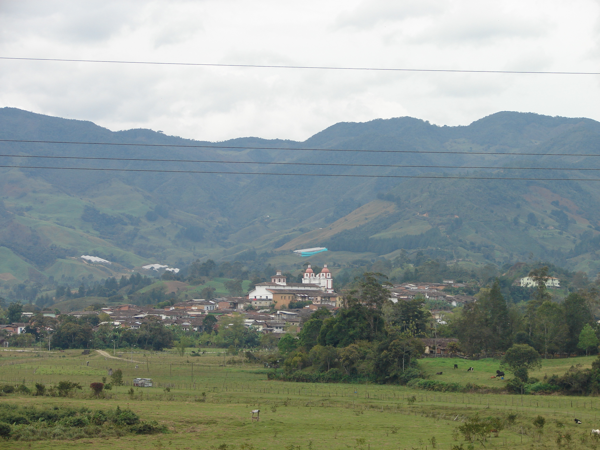 Panorámica del municipio del Carolina del Príncipe, Antioquia, Colombia